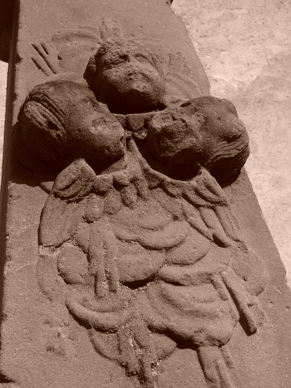 croix de carrefour en grès rose